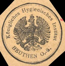 Sealing stamp Title: Königliches Hygienisches Institut Beuthen Description: schwarz, weiß Place: Beuthen size: 4 cm